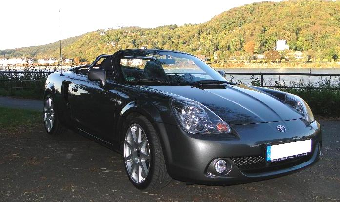 Toyota MR 2 W3 Edition S (In Deutschland auf 100 Stück limitierte Sonderauflage zum Produktionsende)